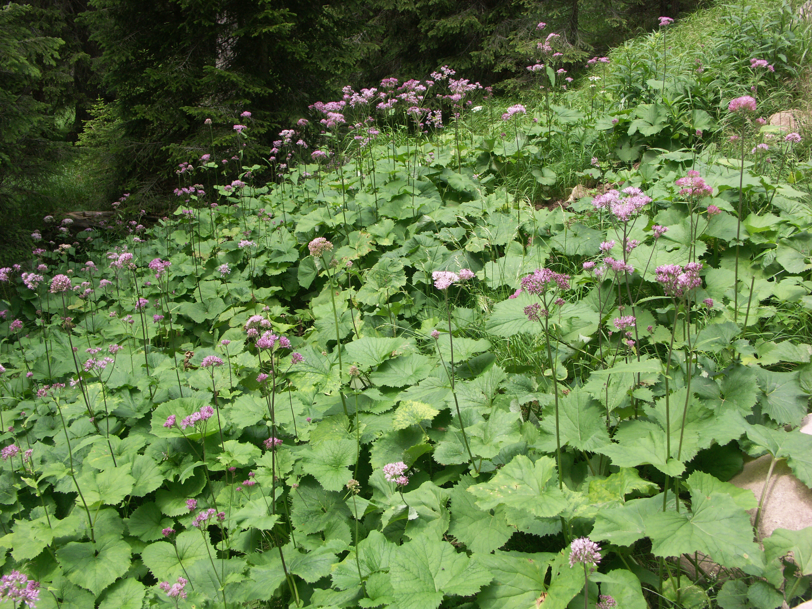 Bildautor: Rüdiger Kratz, Deutschland, 66386 St. Ingbert Aufnahmeobjekt: Grauer Alpendost, Standortübersicht Aufnahmeort: Norditalien, westlich des Passo Rolle Aufnahmedatum: Juli 2005